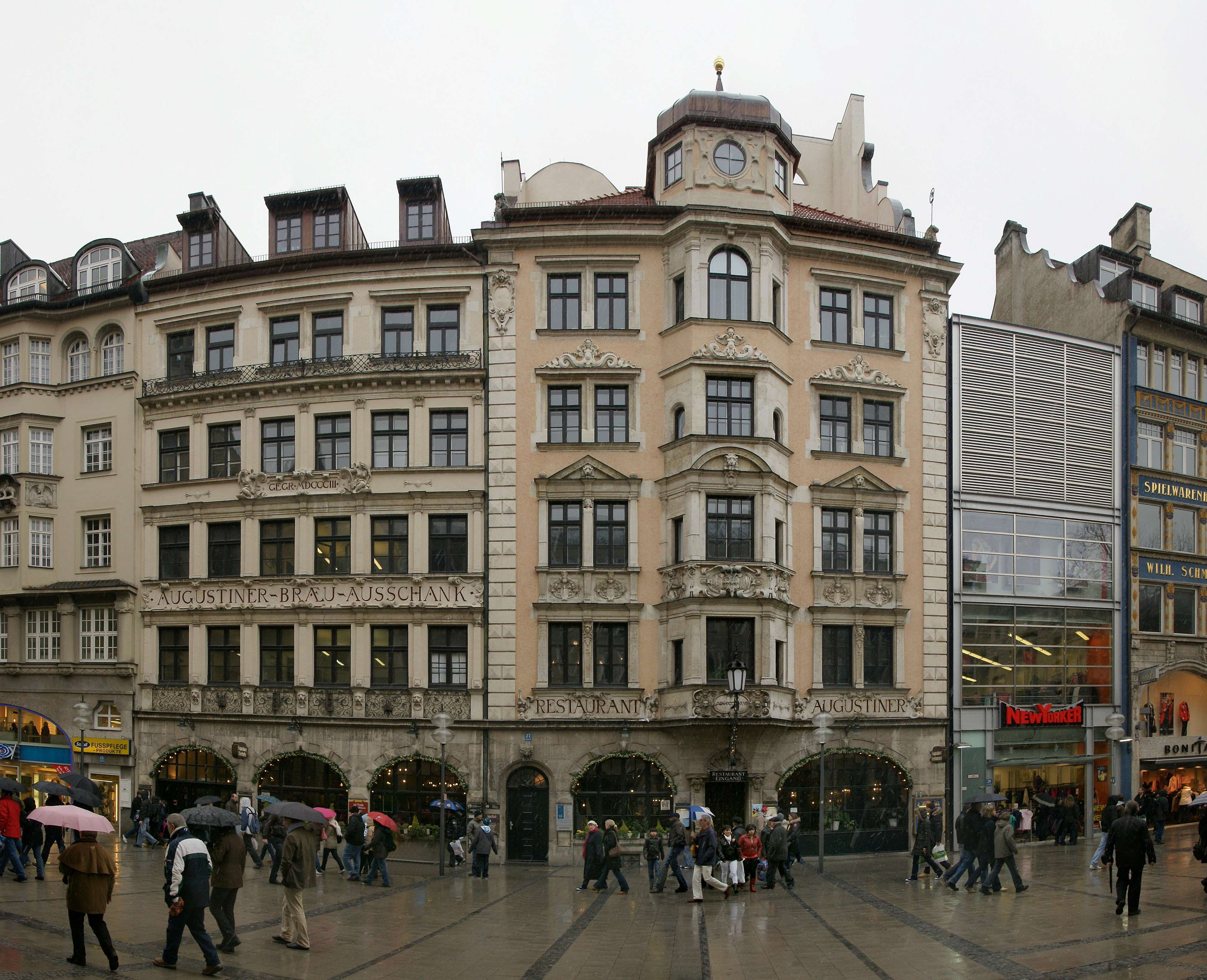 Zweites Stammhaus der Augustiner-Bräu bis 1885. Um die Jahrhundertwende Umgestaltung durch den Architekten “Emanuel von Seidl” zur Augustiner Großgaststätten, die mit dem Muschelsaal und dem Arkadengarten heute zu den wenigen unverändert erhalten gebliebenen Baudenkmälern des Münchner Jugendstils zählen. Aufgenommen in der Münchner Fußgängerzone, Neuhauser Straße 27.